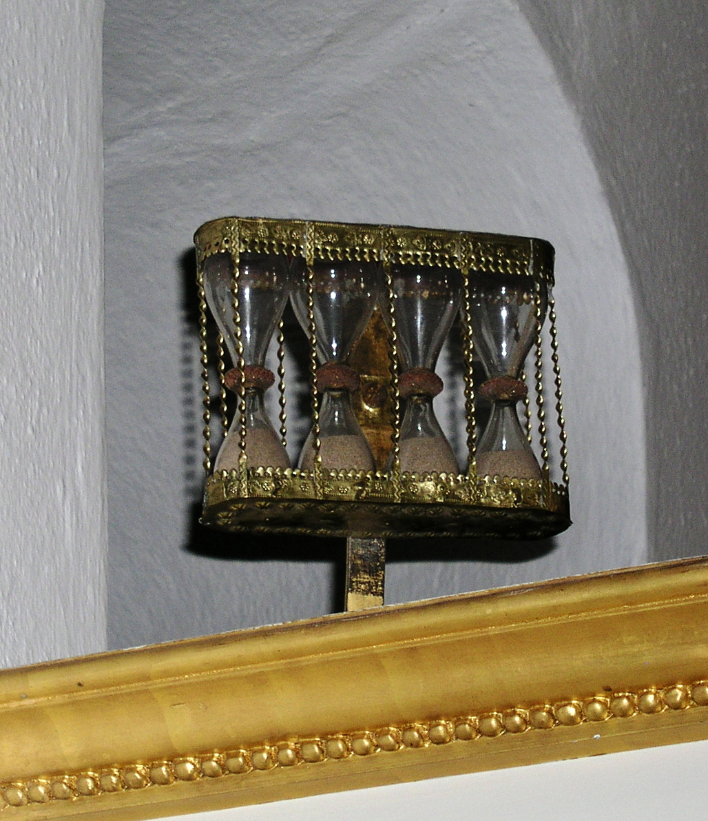 Rystads kyrka, Diocese of Linköping, Linköpings kommun. Sand-glass.